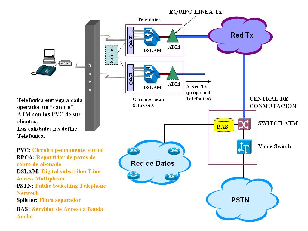 Versión esquematizada del Bucle Local en España.